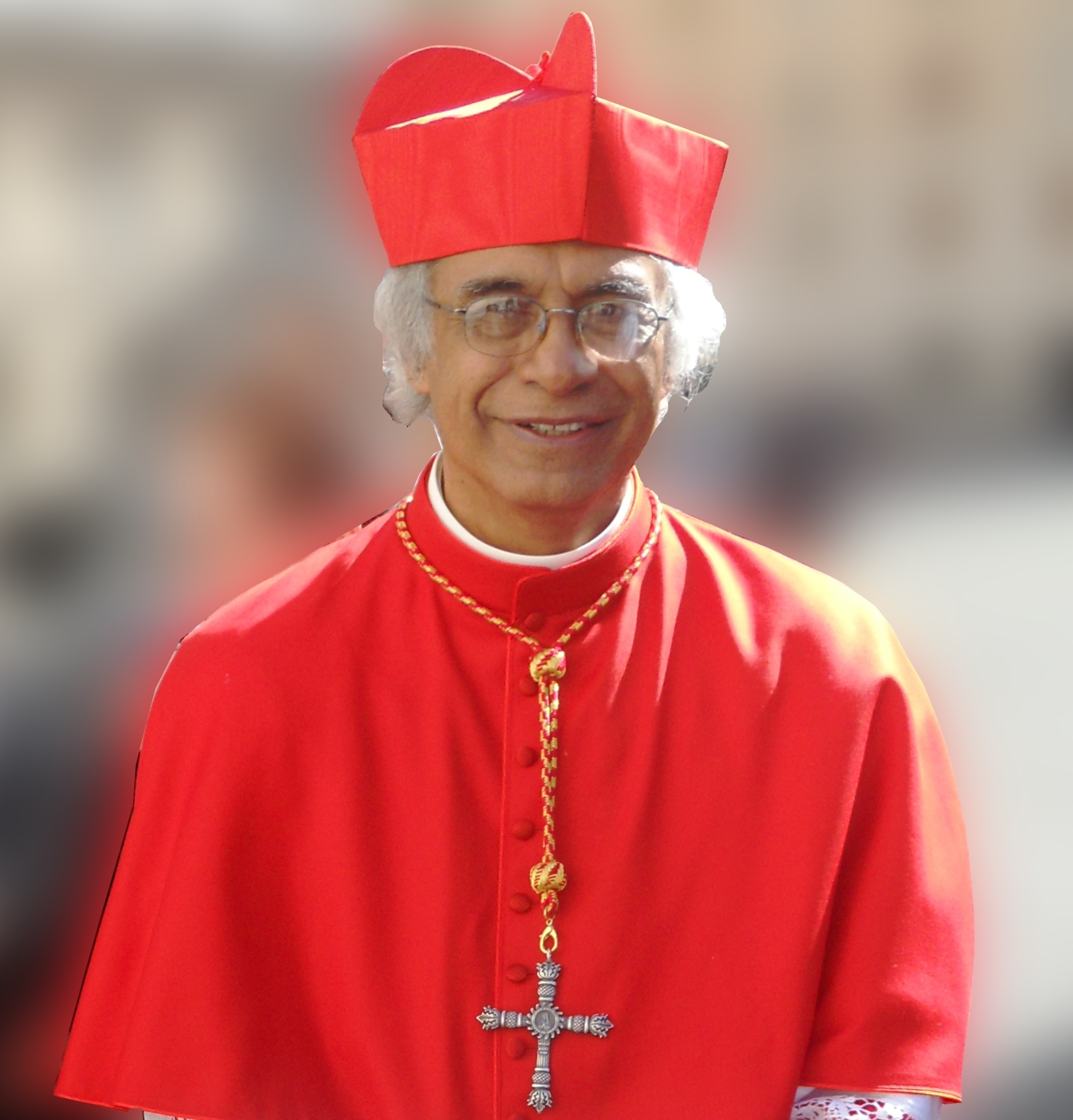 Leopoldo José Cardinal Brenes Solórzano